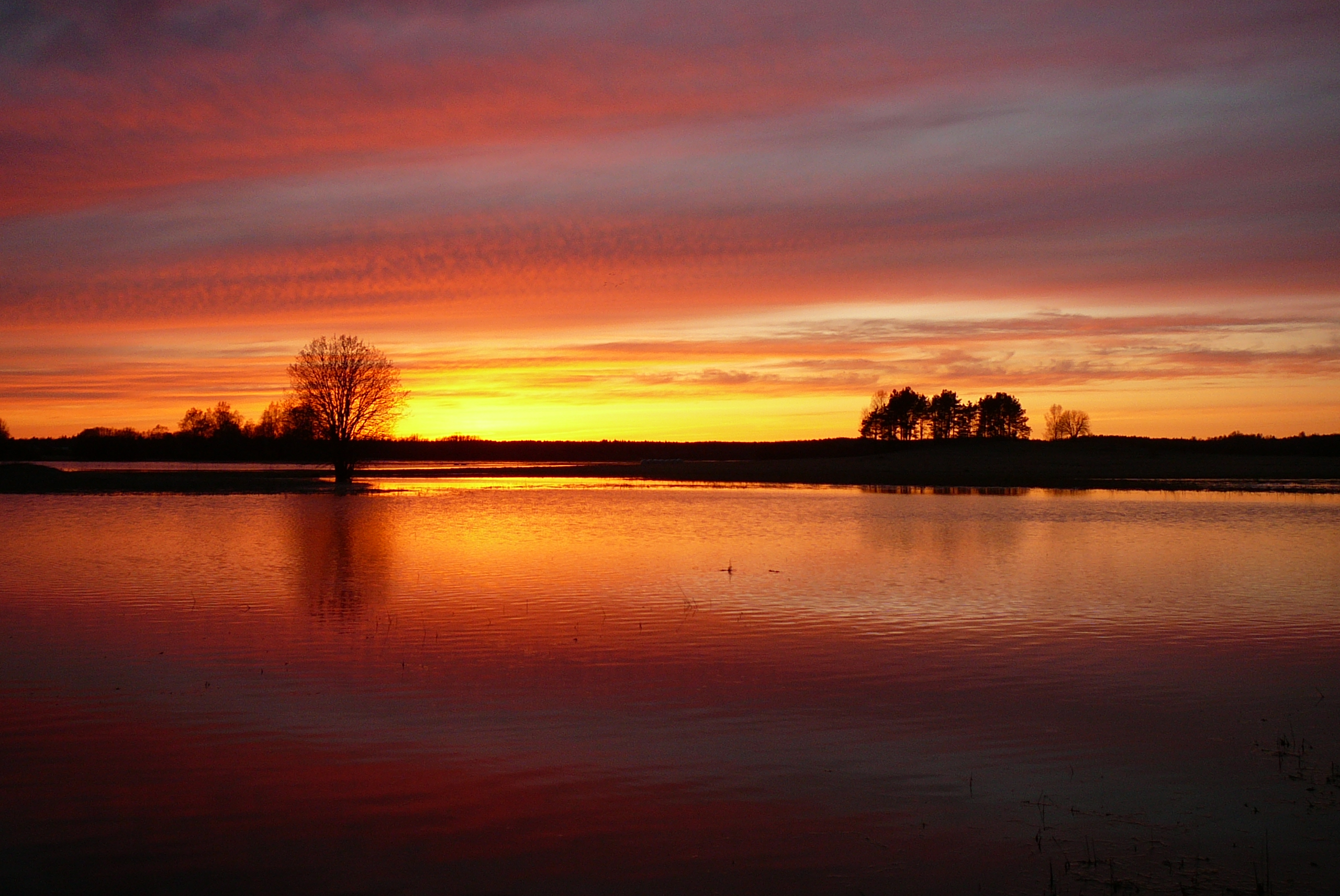 Suurvesi Assamalla luhal mai kuus 2010